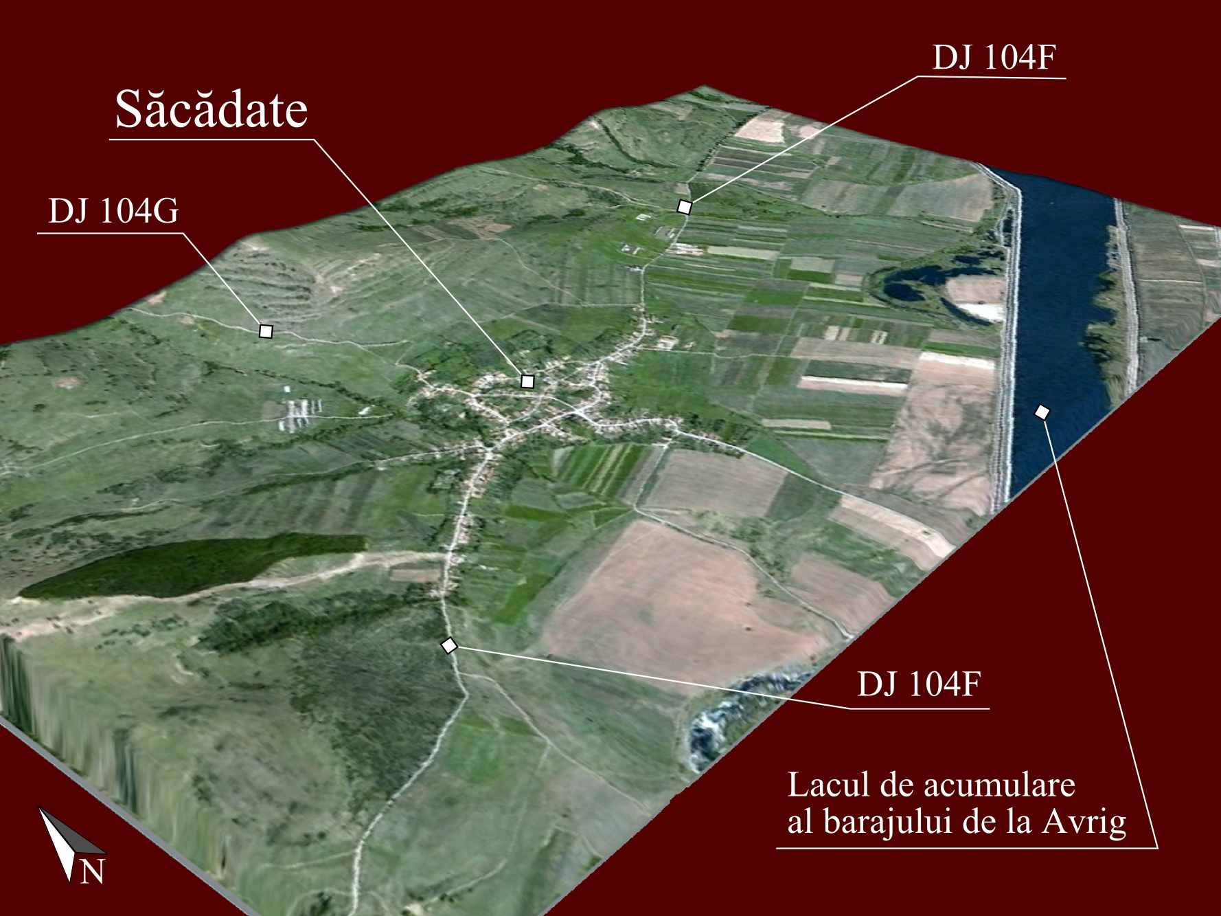 Prelucrare 3D pentru Sacadate, Sibiu. Imagine realizata cu date SRTM furnizate liber de NASA si textura World Imagery.